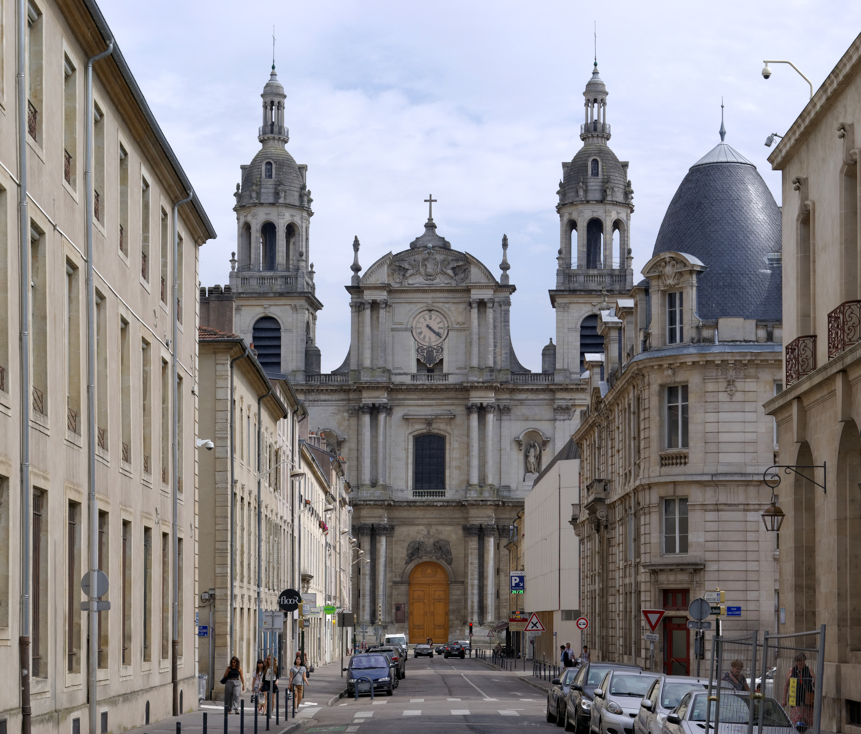 Frankreich, Nancy, Kathedrale Notre-Dame-de-l'Annonciation (Maria Verkündigung)